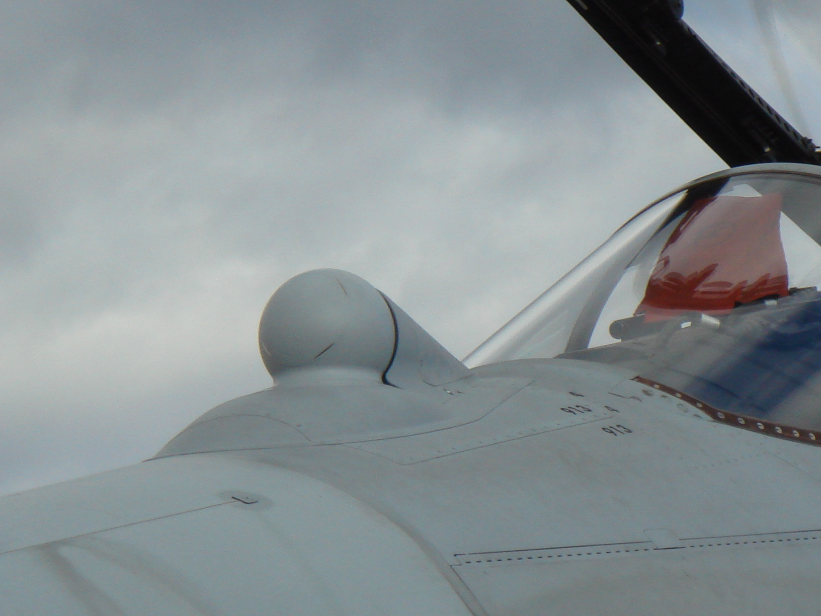 航空自衛隊 F-15J戦闘機（12-8928号機) 機首IRST。 08年11月30日 航空自衛隊岐阜基地にて。